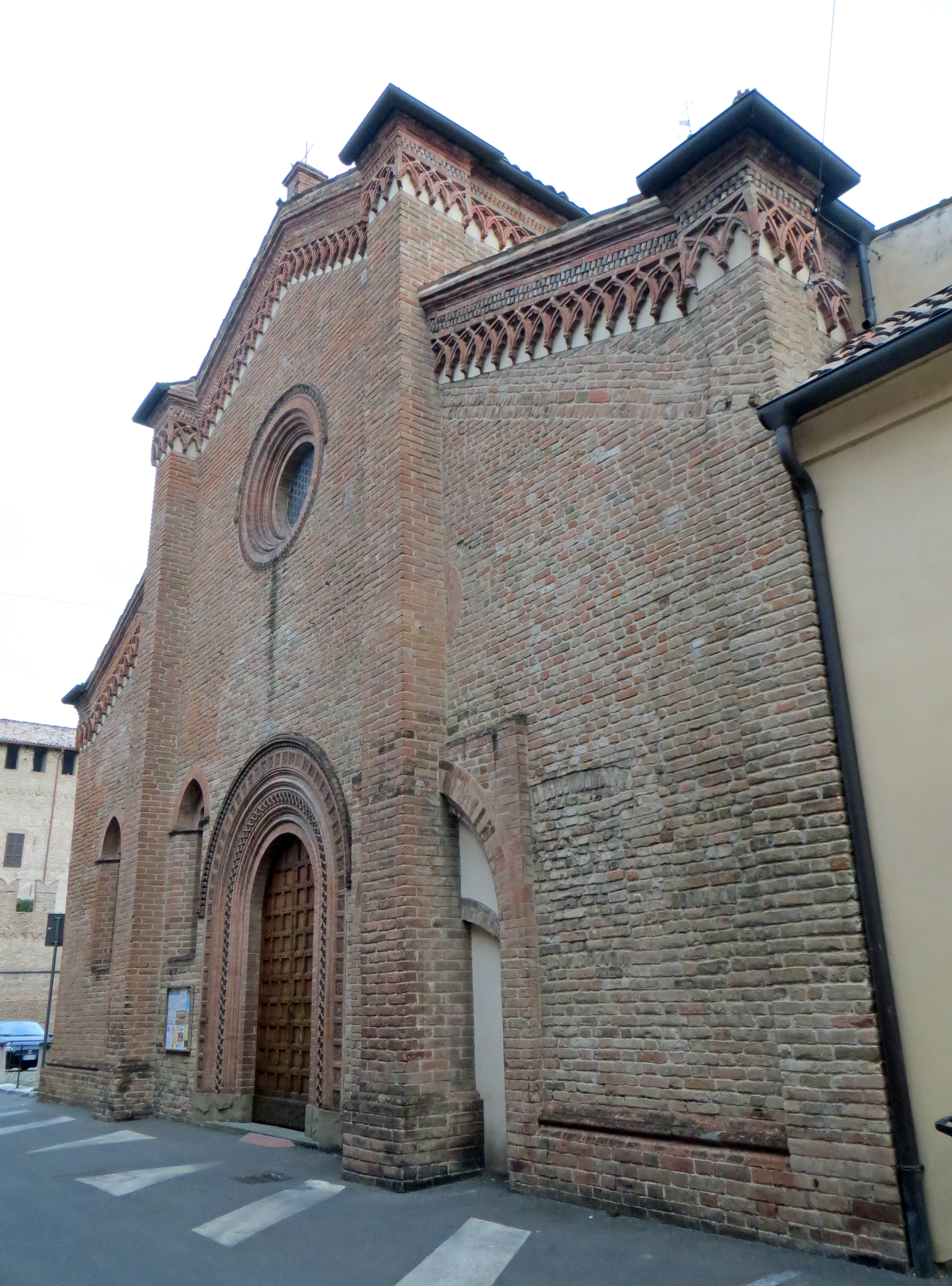 Chiesa di Santa Croce (Fontanellato) - facciata